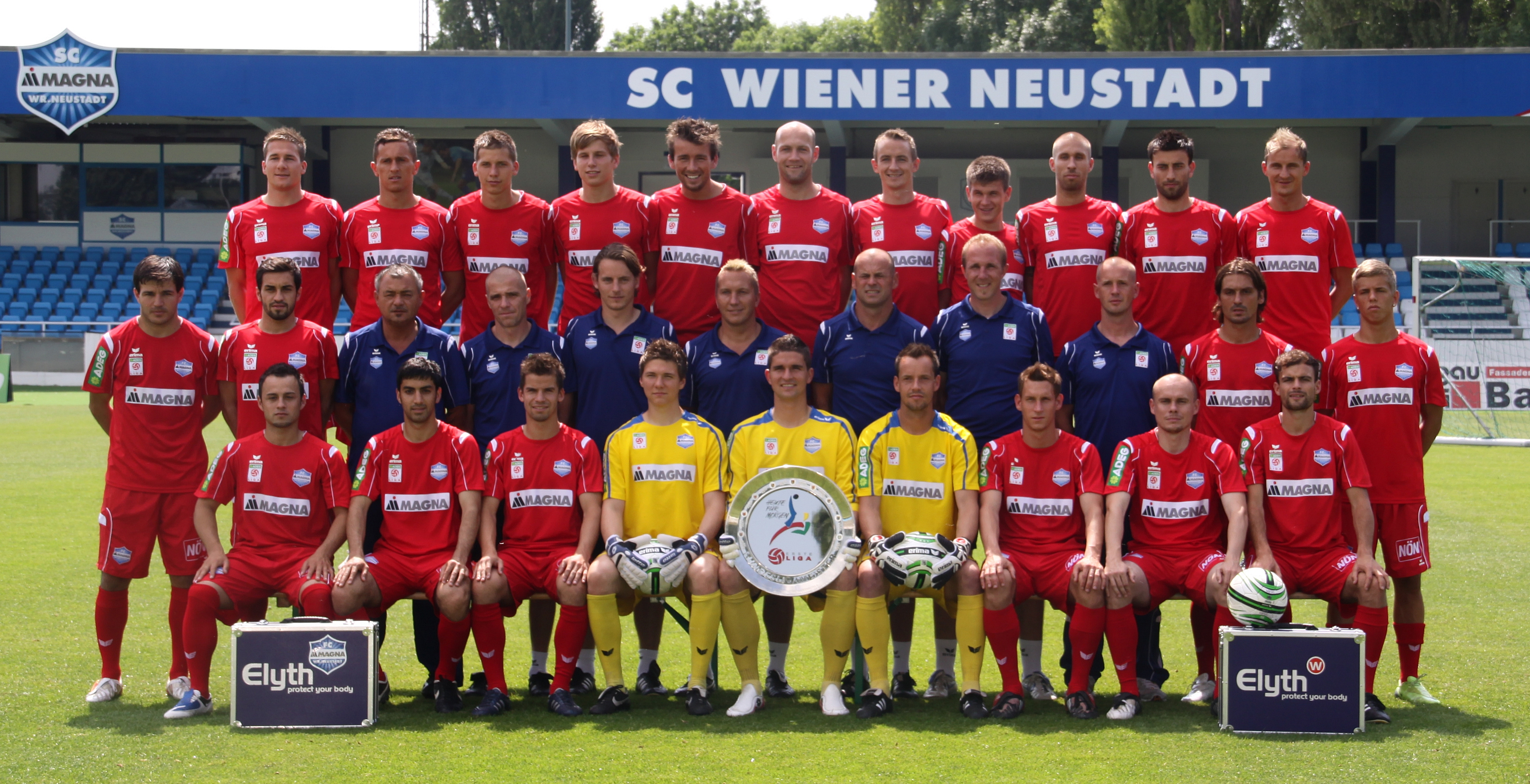 SC Wiener Neustadt, Meister 2008/09 der österreichischen Ersten Liga – vordere Reihe (jeweils von links nach rechts): Harun Erbek, Taner Ari, Tomas Šimkovič, Udo Siebenhandl, Sašo Fornezzi, Manfred Razenböck, Michael Stanislaw, Václav Koloušek, Alexander Hauser – mittlere Reihe: Sebastián Martínez, Mirnel Sadović, Michael Götz (Masseur), Klaus Schmidt (Co-Trainer), Johannes Gasselseder (Konditionstrainer), Manfred Schmid (Co-Trainer), Helmut Kraft (Trainer), Günter Kreissl (Tormann-Trainer), Christoph Hallbrucker (Masseur), Sanel Kuljic, Rene Felix – hintere Reihe: Daniel Dunst, Mensur Kurtisi, Guido Burgstaller, Alexander Grünwald, Mario Reiter, Petr Johana, Johannes Aigner, Tomislav Micanovic, Partick Wolf, Yüksel Sariyar und Wolfgang Klapf – fehlend: Georg Margreitter.